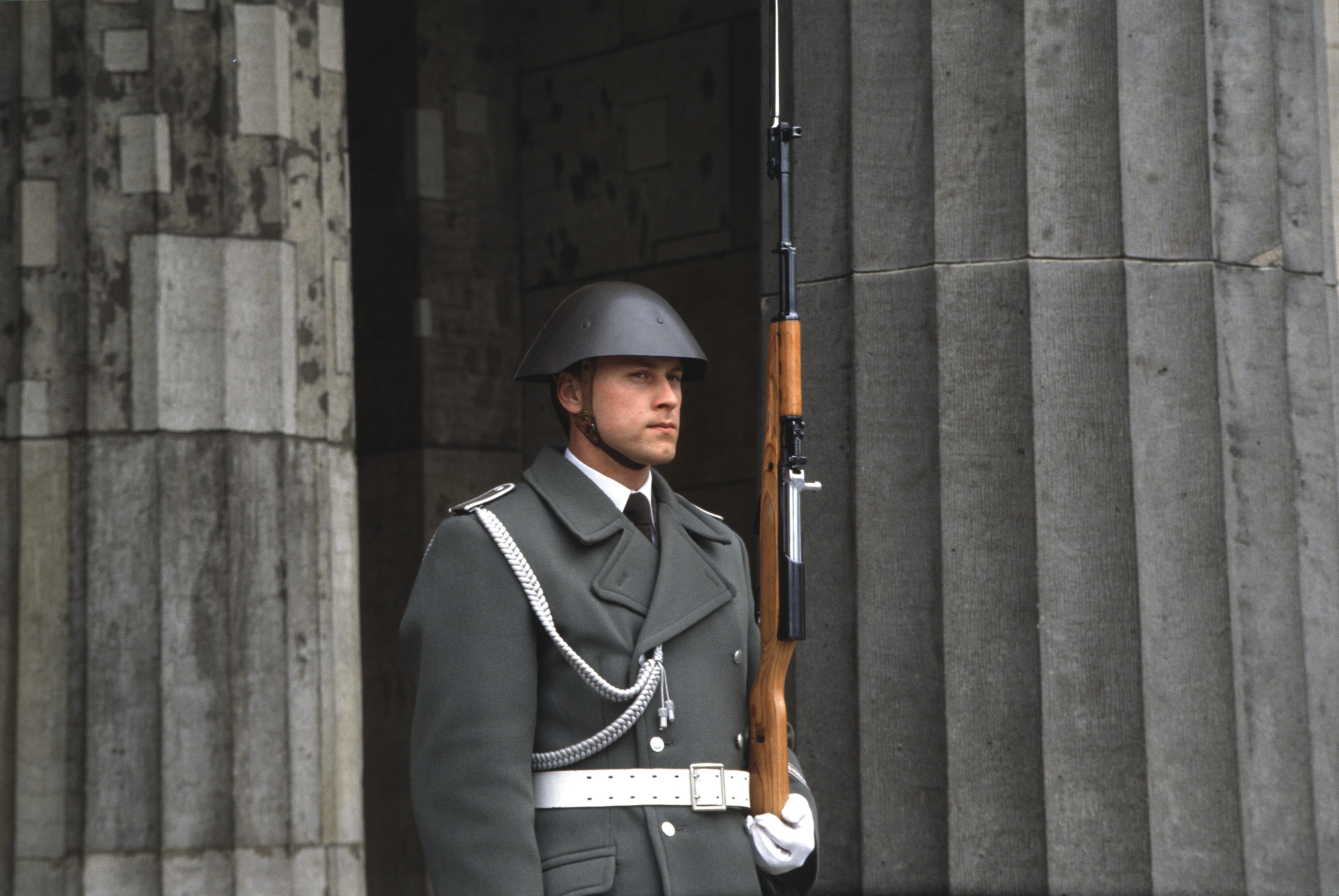 Soldat des Wachregiments vor der Neuen Wache